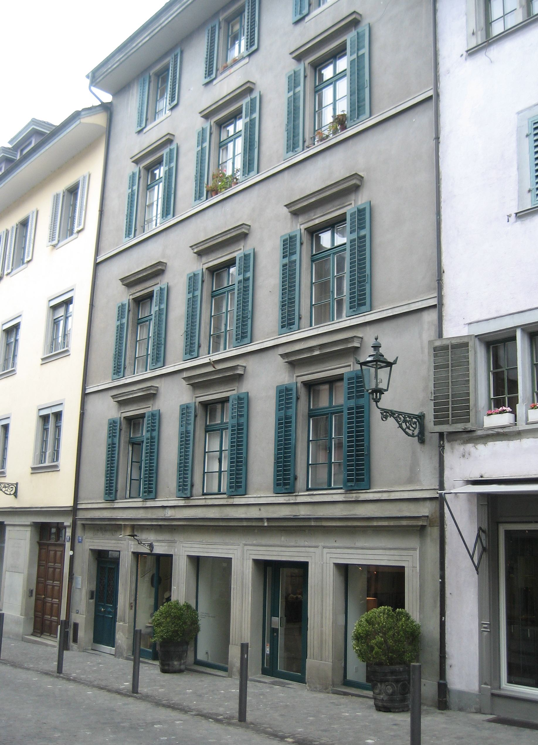 Haus zum Mohrenkopf am Neumarkt 13 in Zürich, letztes Wohnhaus von Katharina von Zimmern 1540 - 47